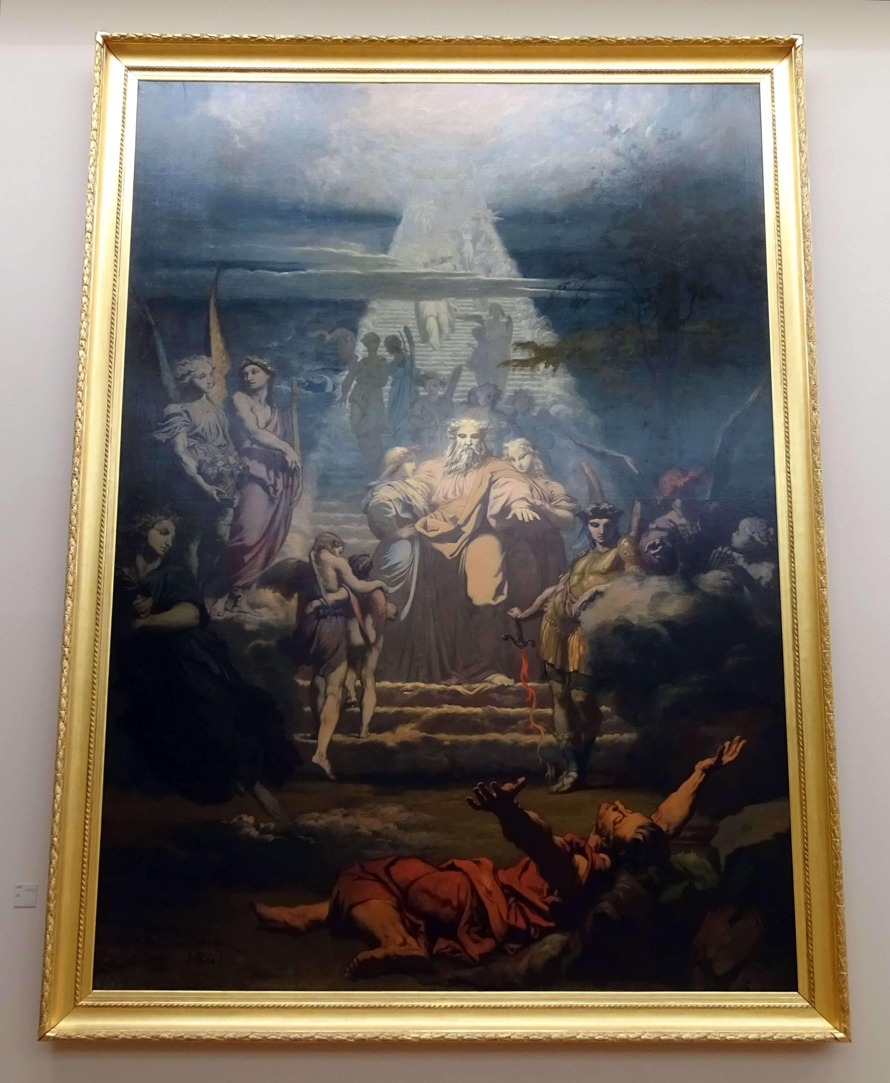 Alexandre Laemlein (1813-1871), L'Échelle de Jacob, 1847, huile sur toile, musée de Grenoble.